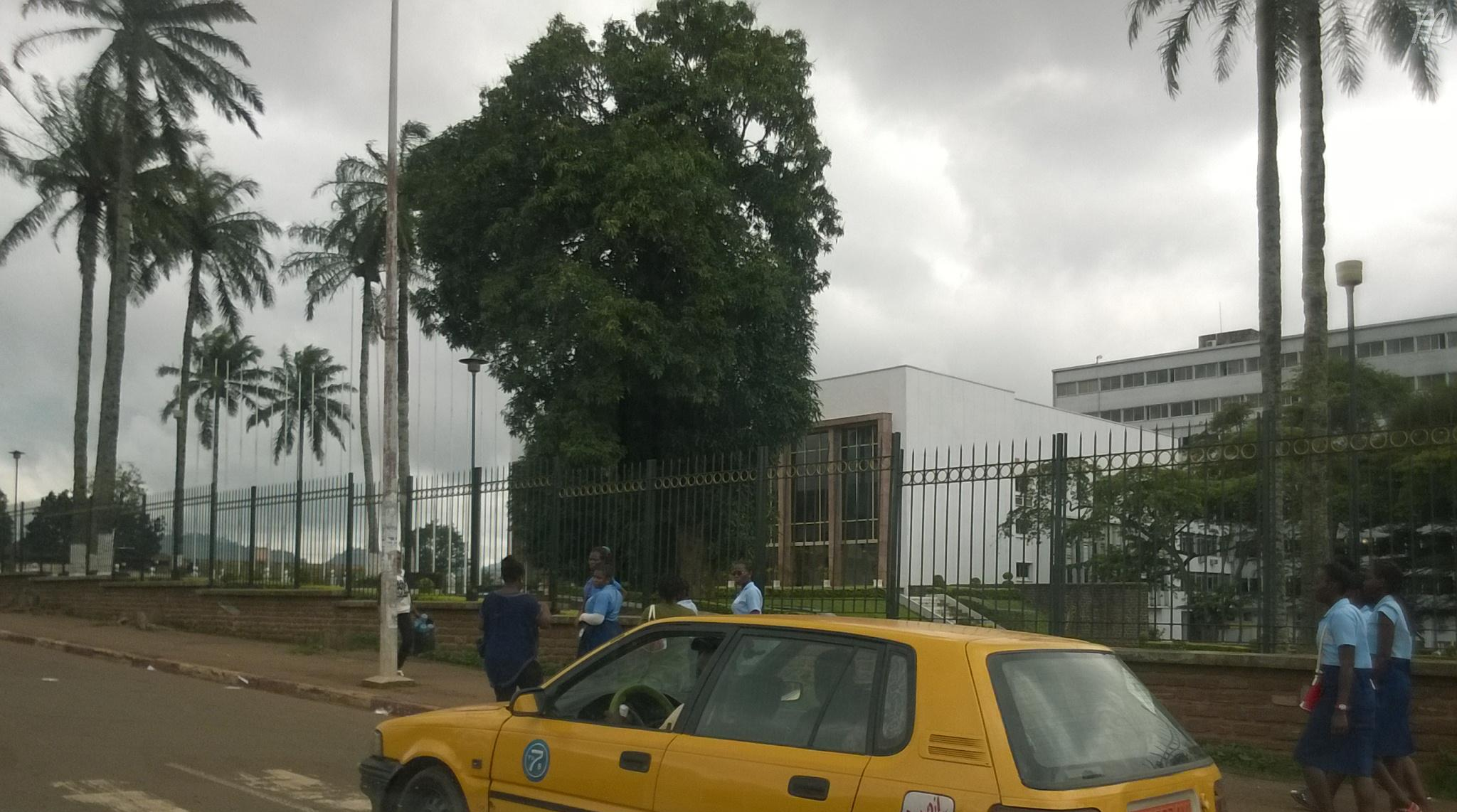 Avenue de France, Yaoundé III